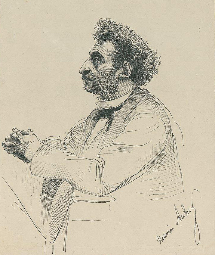 Portrait de Maurice Aubry. Bibliothèque nationale de France, département Estampes et photographie